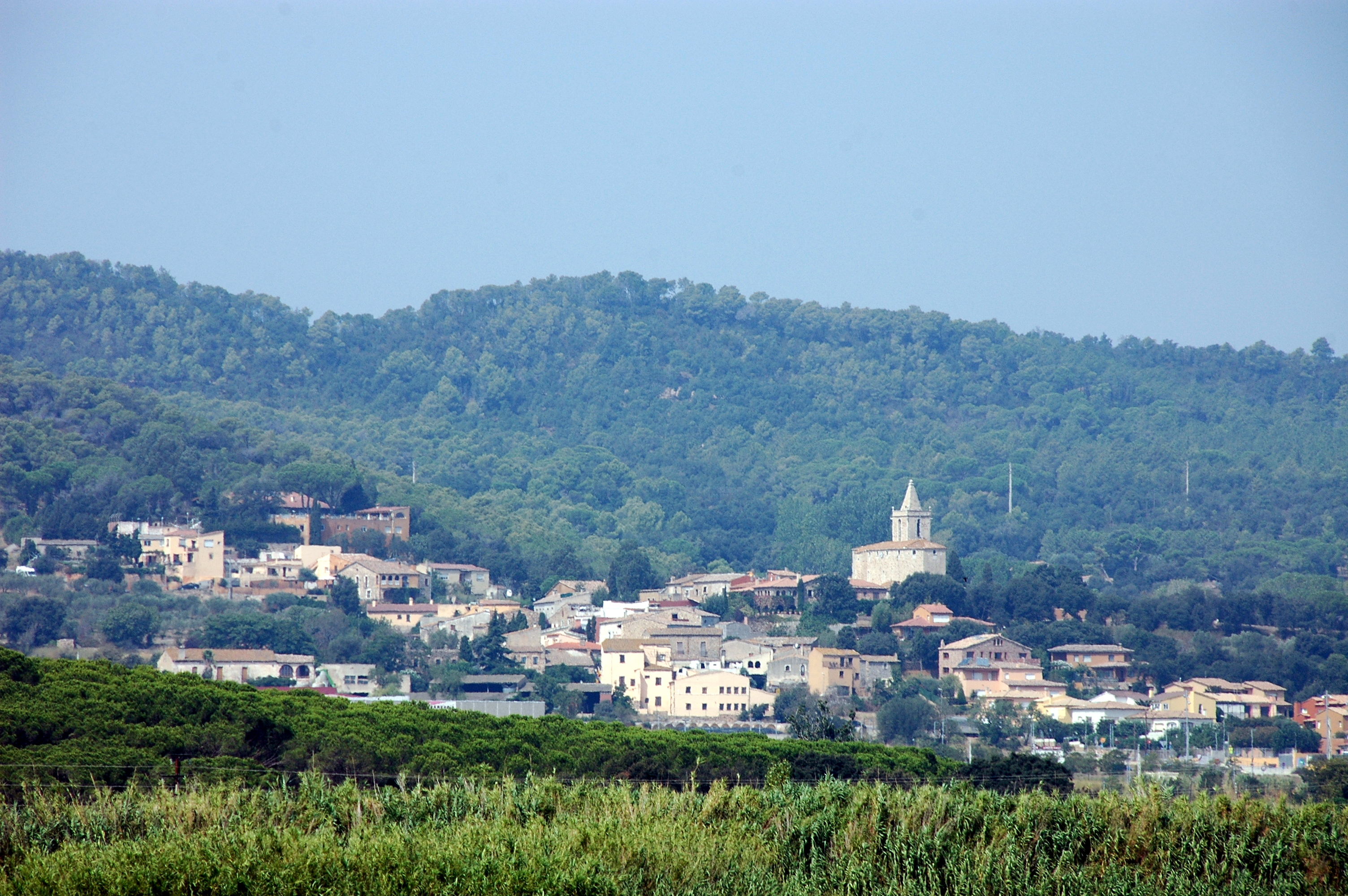 Església parroquial de Sant Esteve (Mont-ras)